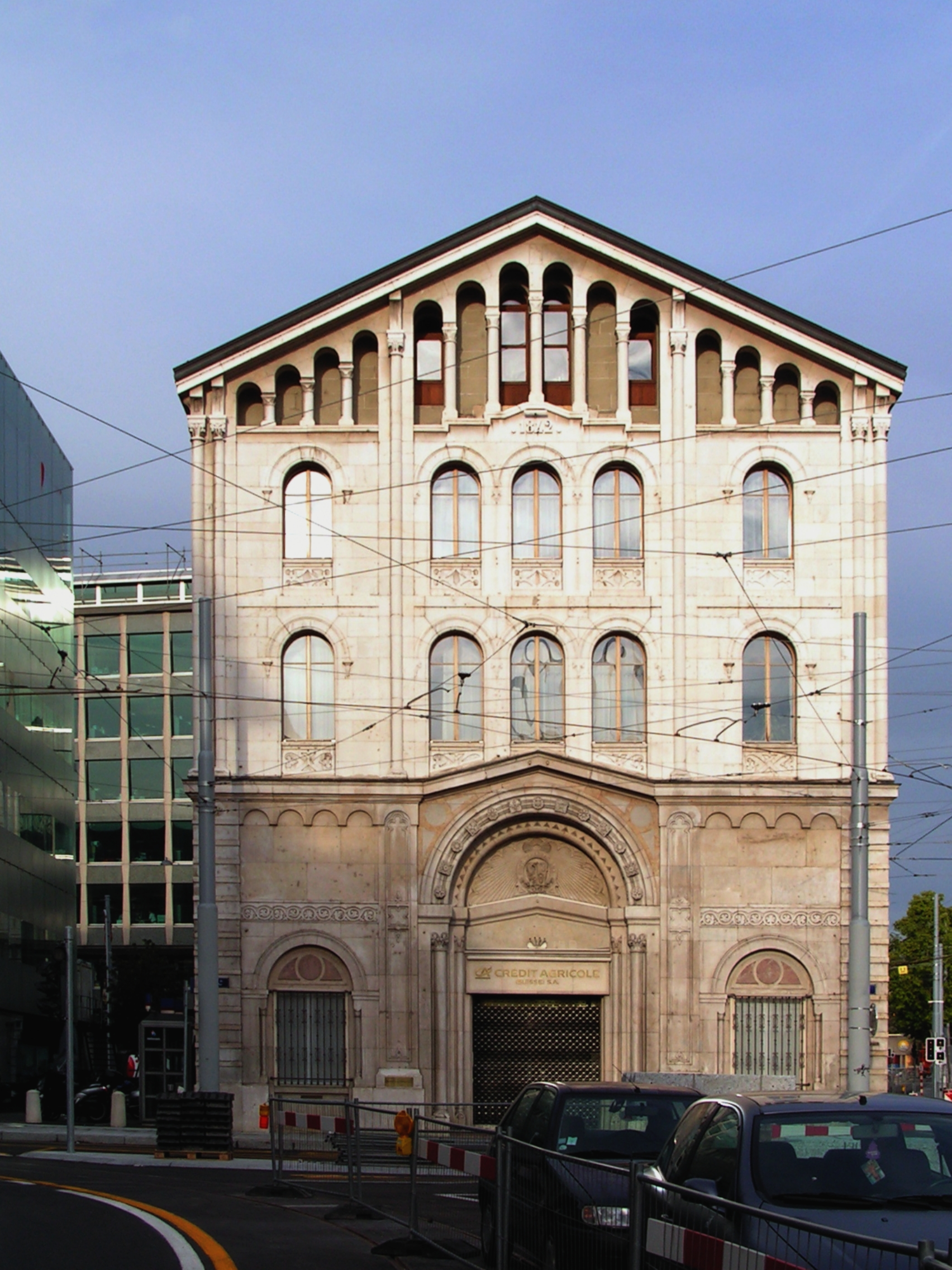 Quai de la Poste 18, Genève. Ancien immeuble du Crédit Lyonnais.